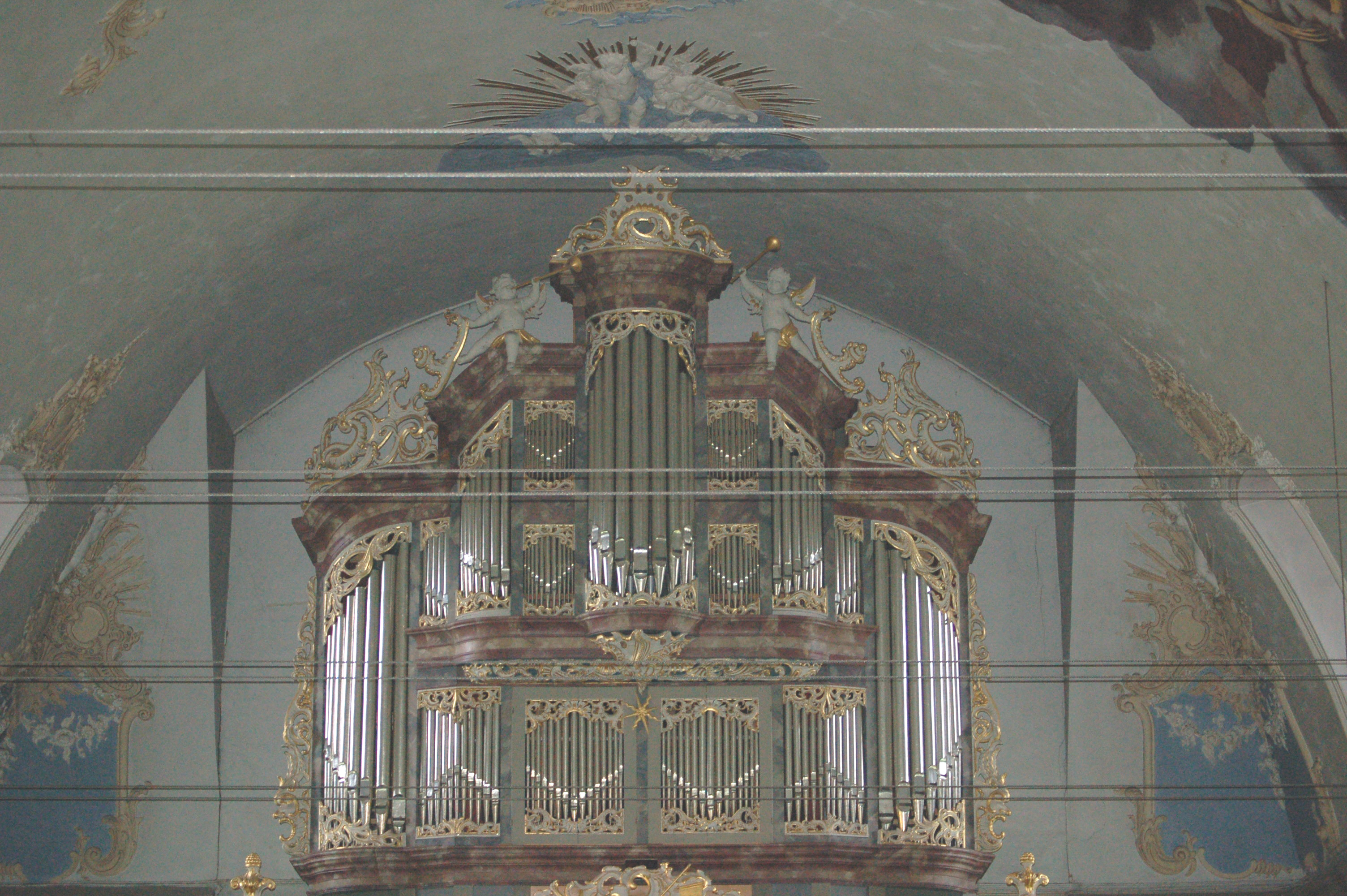 Orgel der Klosterkirche Uetersen von Johann Dietrich Busch (1700-1753)